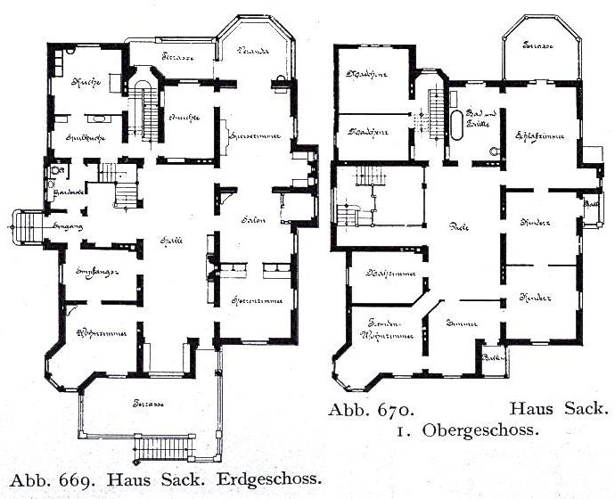 Haus Sack am Grafenberger Wald an der Straße nach Rath in Düsseldorf, erbaut vor 1904, Architekt Thilo Schneider.jpg